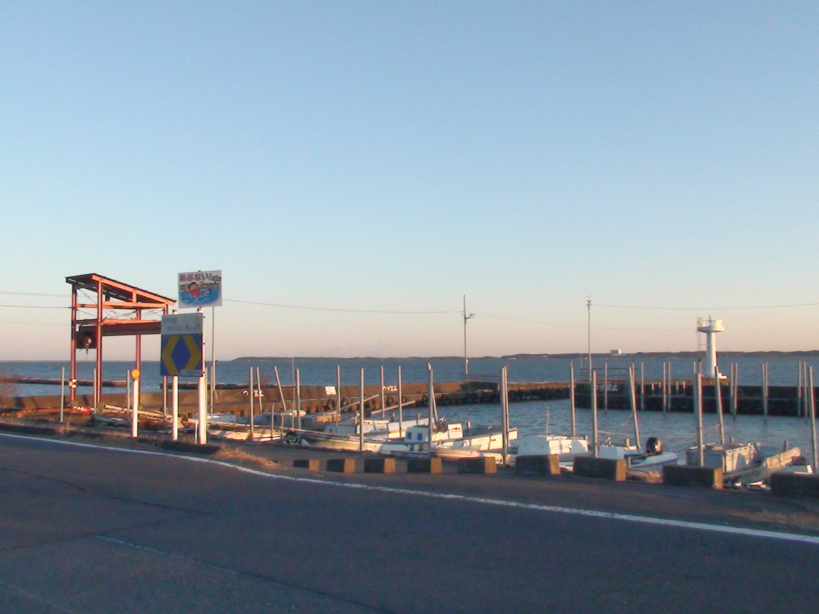 茨城県土浦市沖宿町内の沖宿港